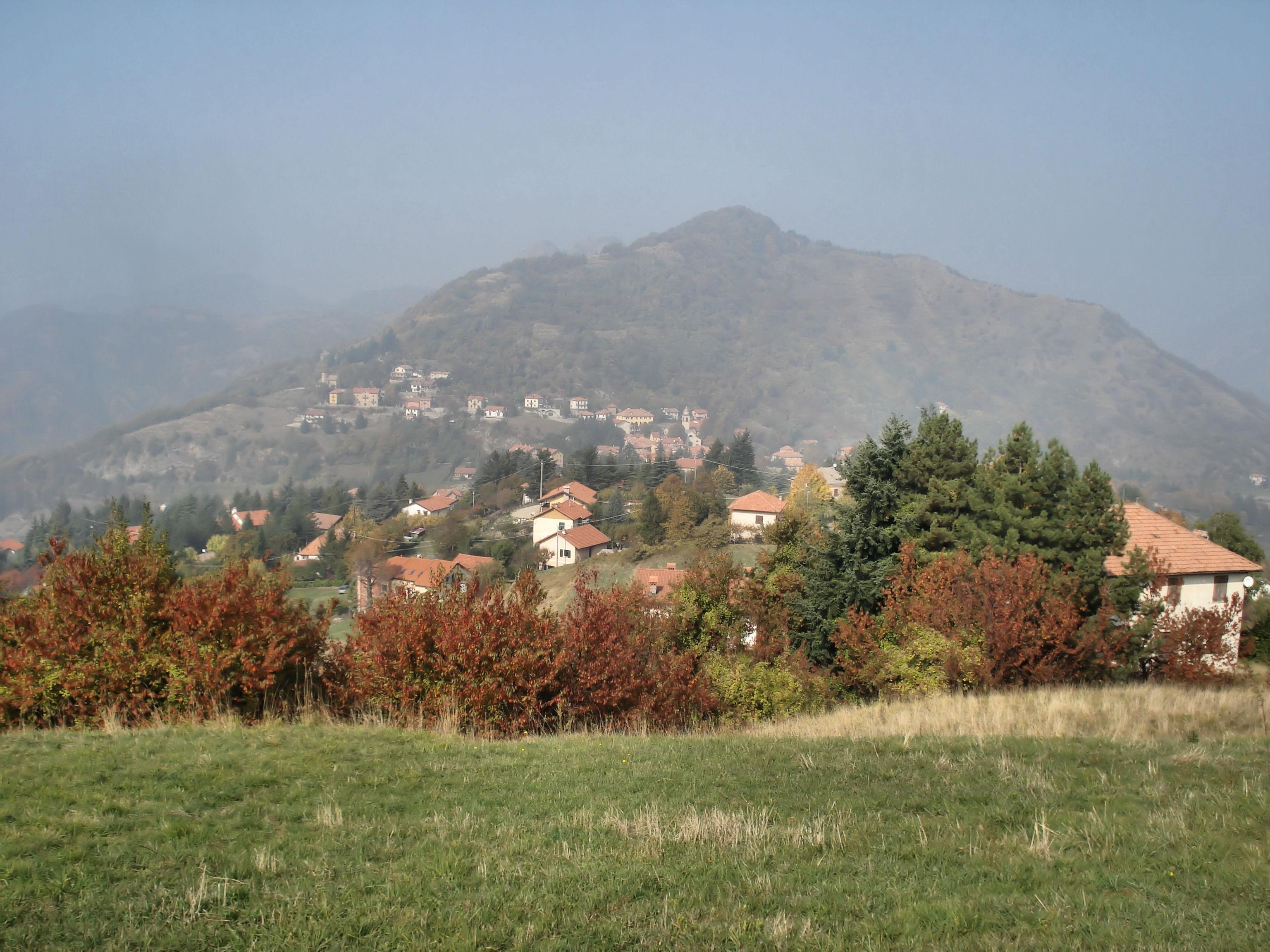 Cosmin latan,Crocefieschi